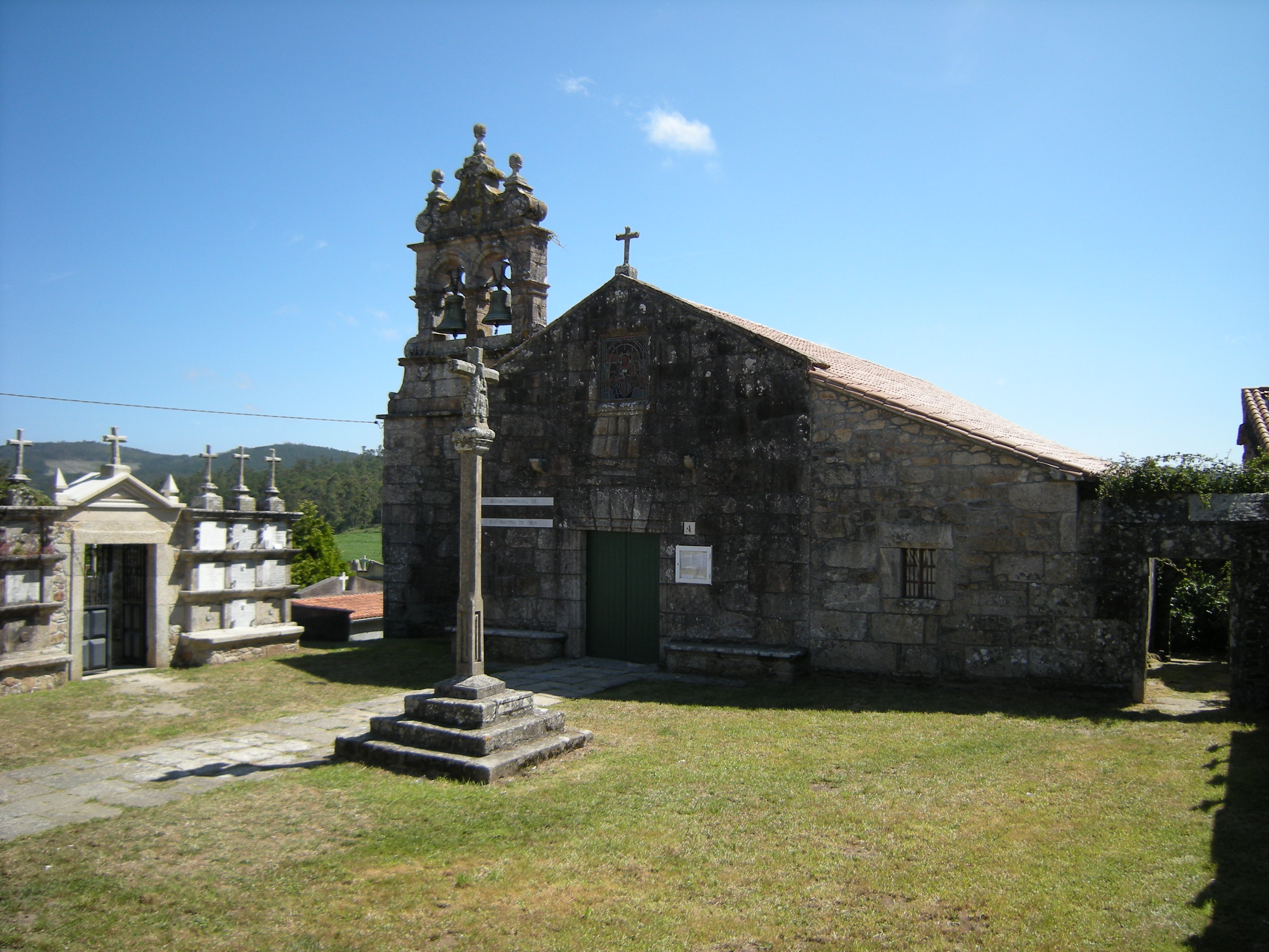 Iglesia construida en el siglo XII y reformada varios siglos después, que perteneció al desaparecido monasterio de Santa María de Ozón.